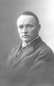 Hendrik Sepp